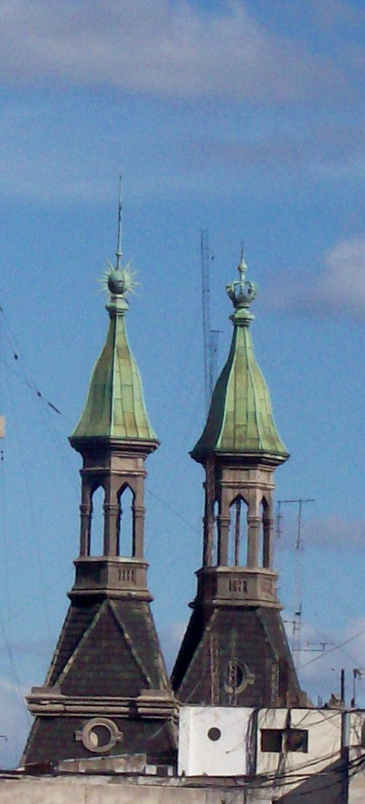 Torres del edificio Otto Wulf, Avenida Belgrano 601, barrio de Monserrat, Buenos Aires, Argentina. Tomada desde el 10 º piso de Julio Argentino Roca 609